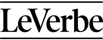 Logo magazine Le Verbe